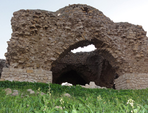 آتشکده فراشبد